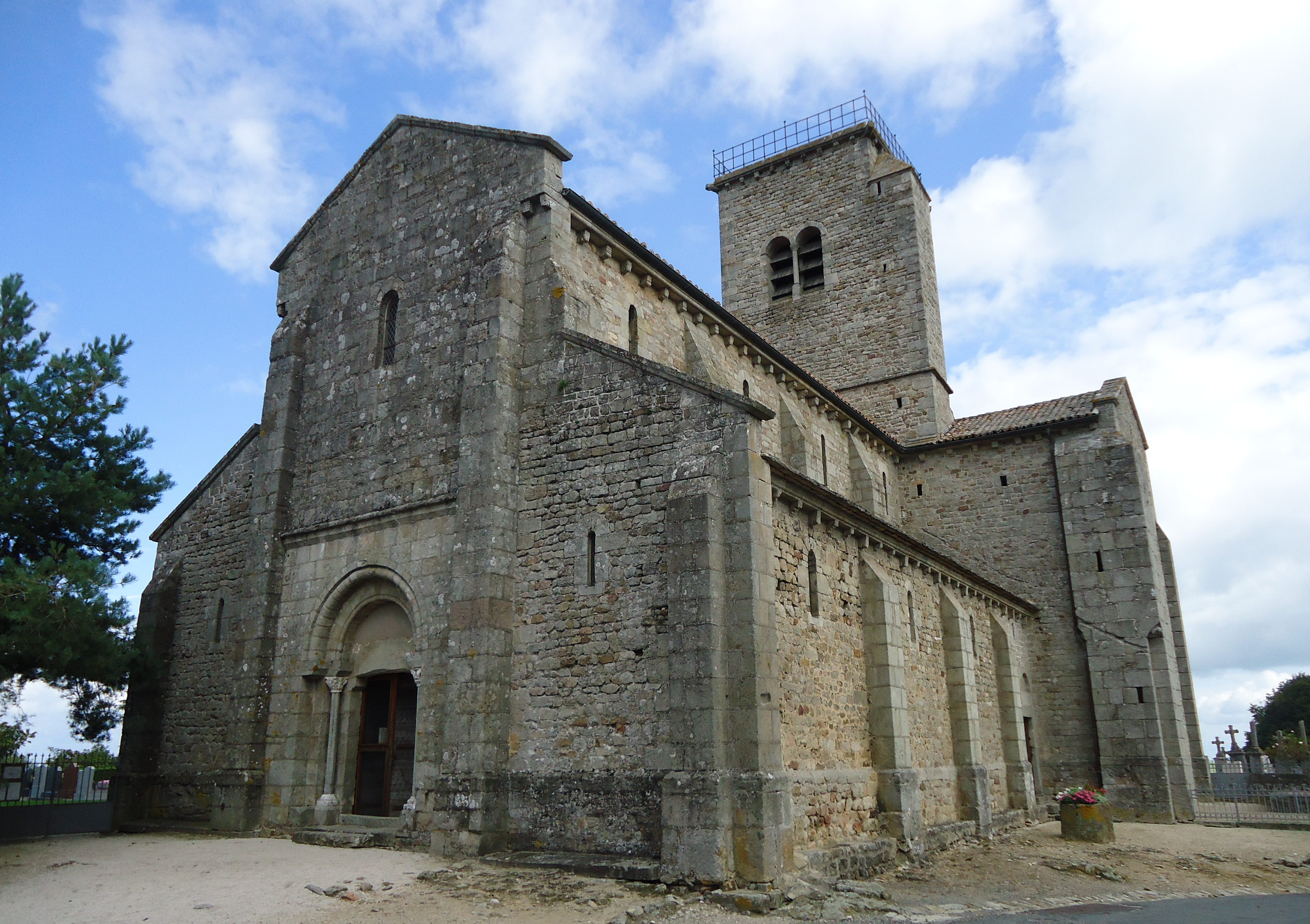 Eglise romane - Gourdon - Saône-et-Loire (71)